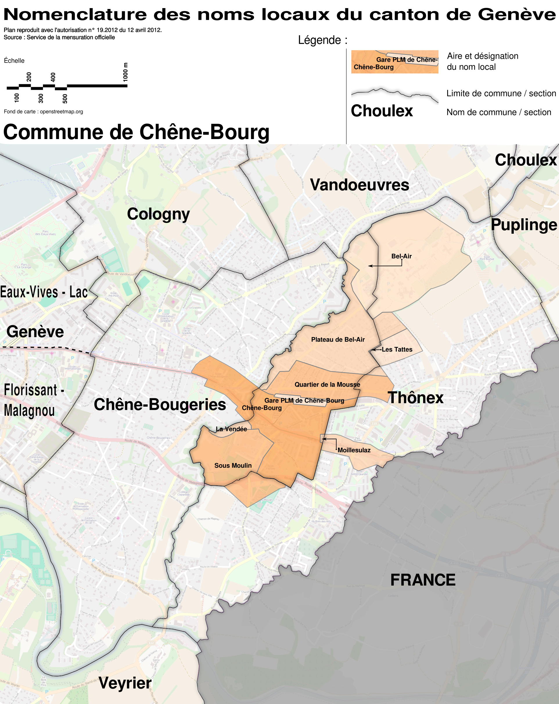 Nomenclature des noms locaux du canton de Genève, généralement appelés "Lieux-dit". Cette nomenclature a été recueillie entre 1932 et 1953 lors de la création du Plan d'Ensemble (PE) du canton de Genève. Plan reproduit avec l'autorisation n° 19.2012 du 12 avril 2012. Source : Service de la mensuration officielle. Noms locaux sur la commune de Chêne-Bourg.